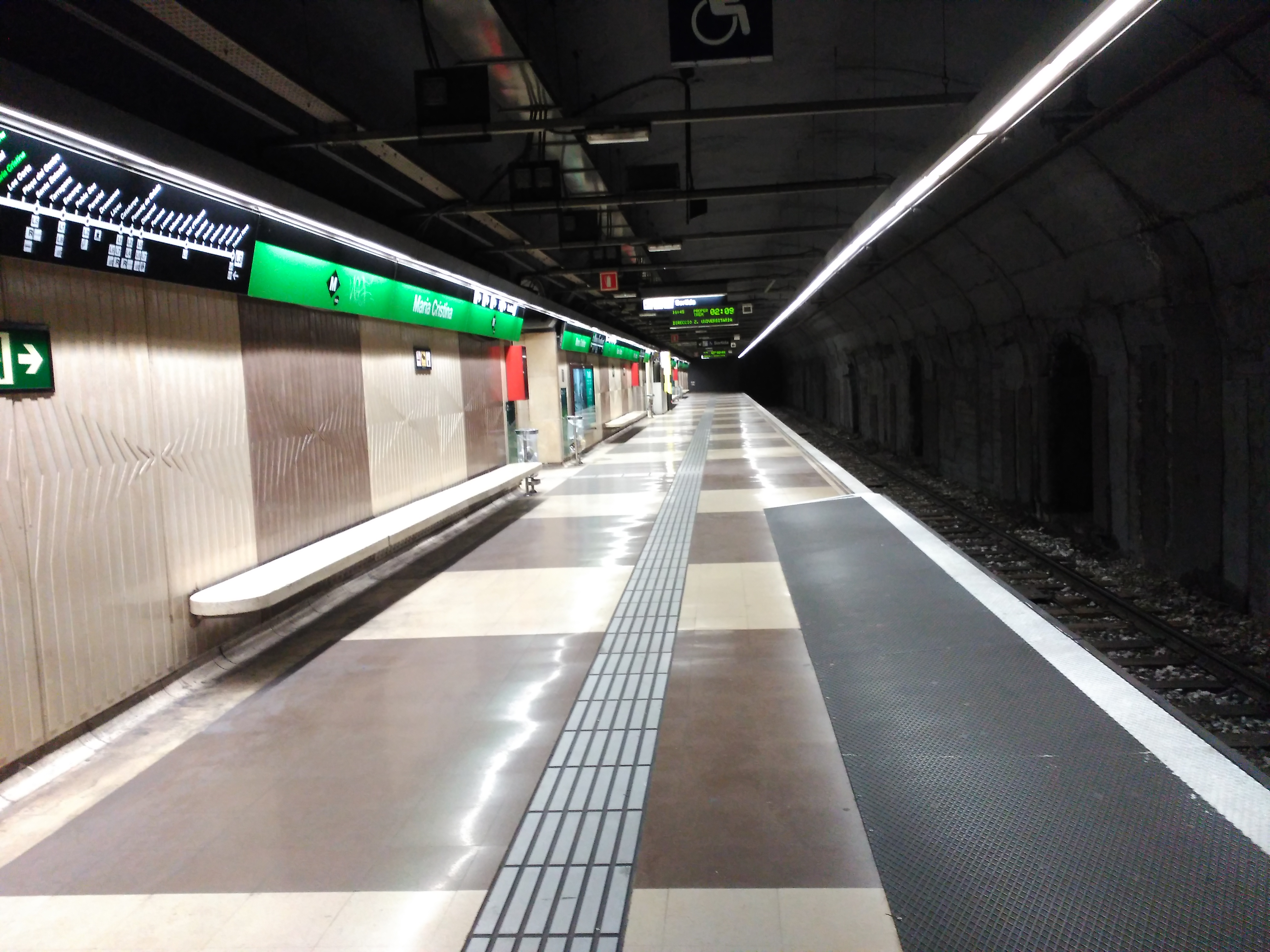 Estació de Maria Cristina